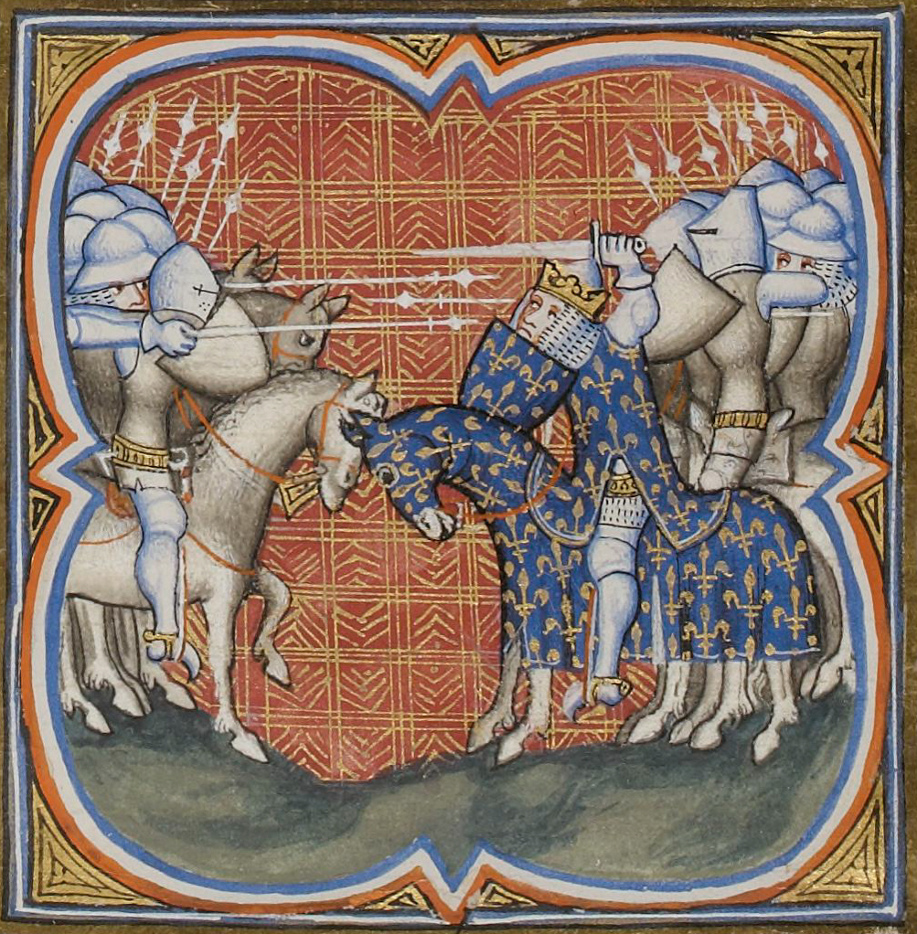 « Bataille entre les Francs, commandés par le roi Clotaire II, et les Saxons ». Grandes Chroniques de France de Charles V. France, Paris, XIVème siècle. 65 x 65 mm. Bibliothèque nationale de France.